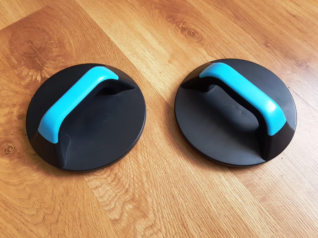 Uchwyty obrotowe do pompek rotating pushup handles Drehbare Liegestützgriffe